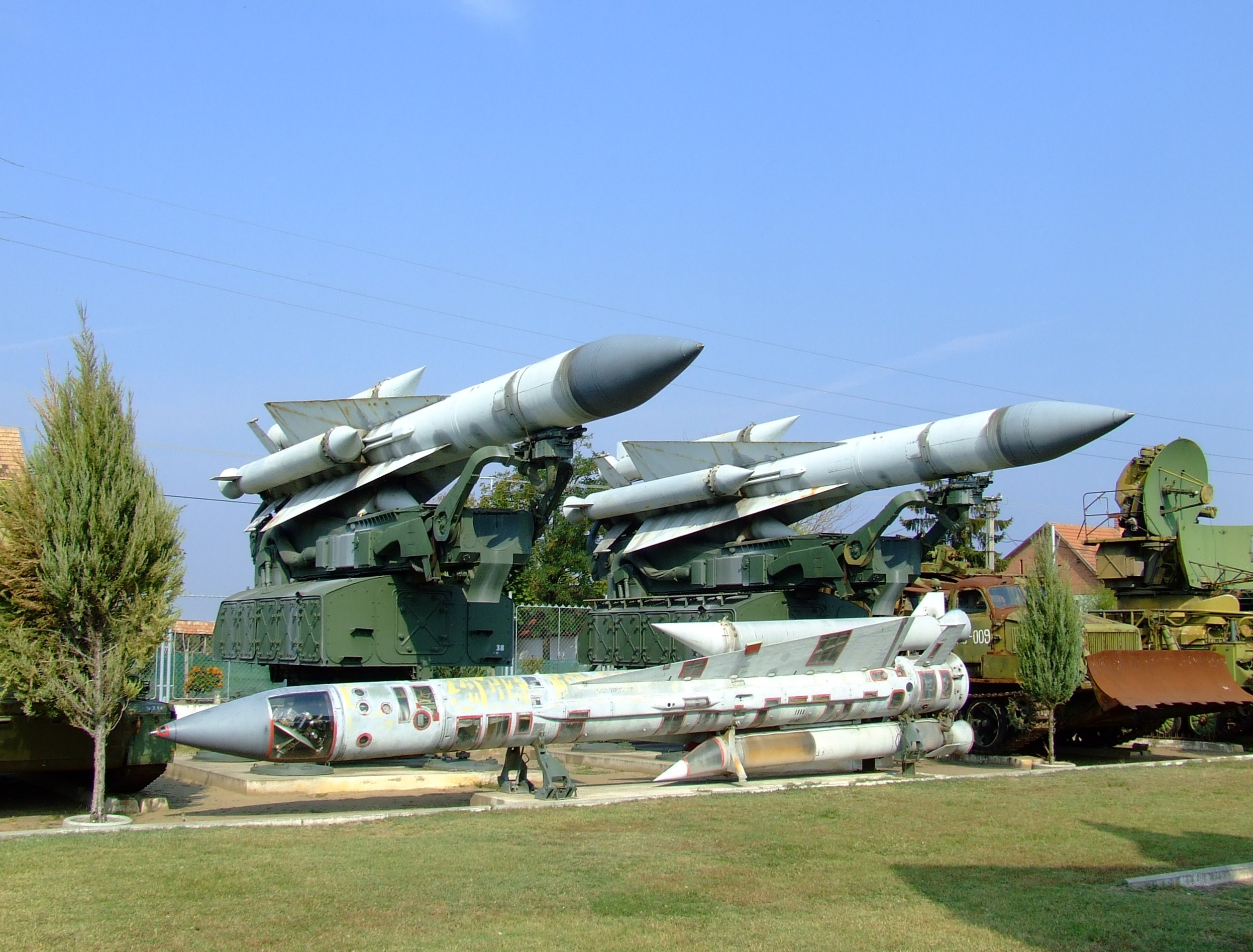 Kecel, haditechnikai park